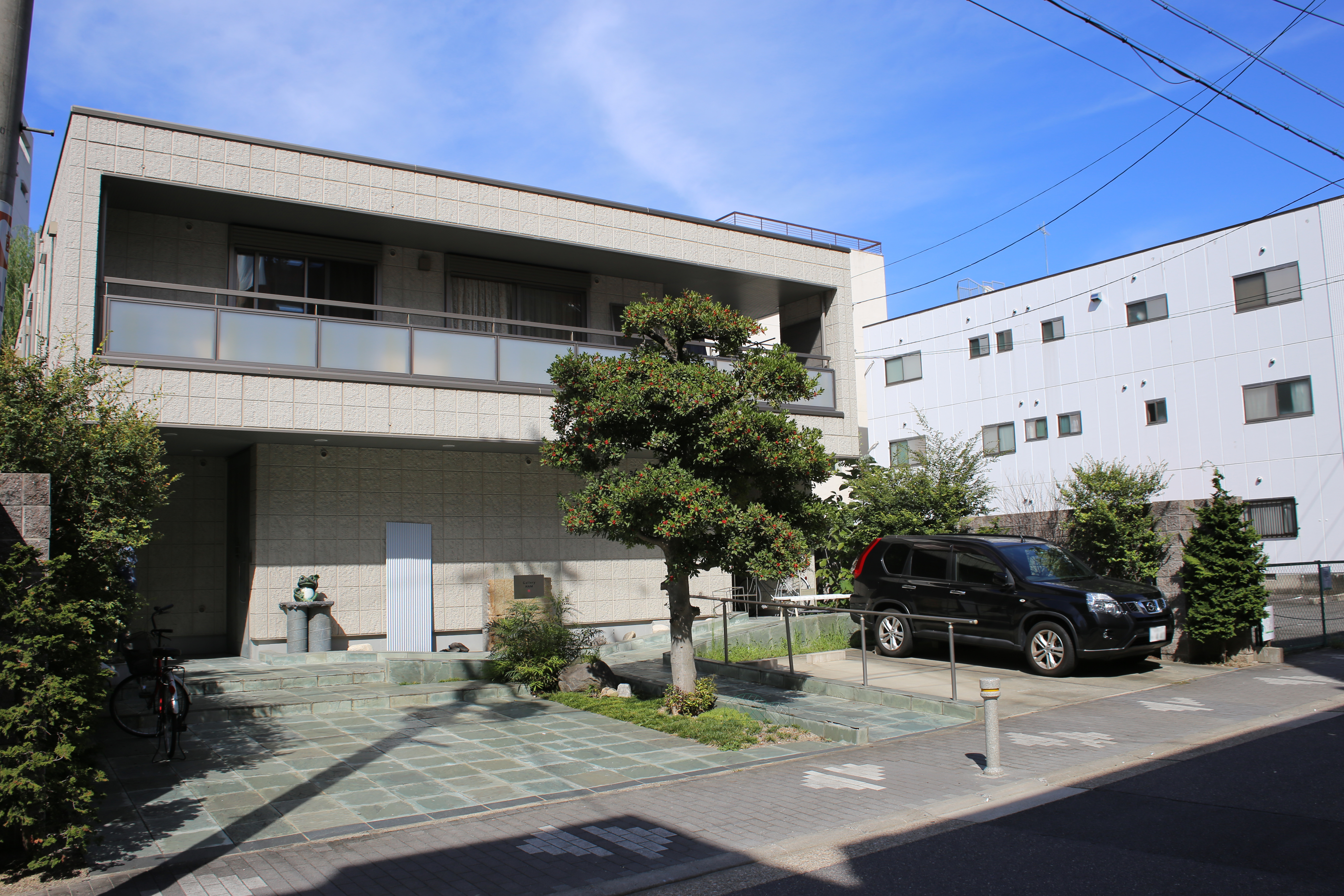 名古屋市千種区のギャラリーHAMを南側公道西側より撮影。ただし、ナンバープレートにつき画像処理済。